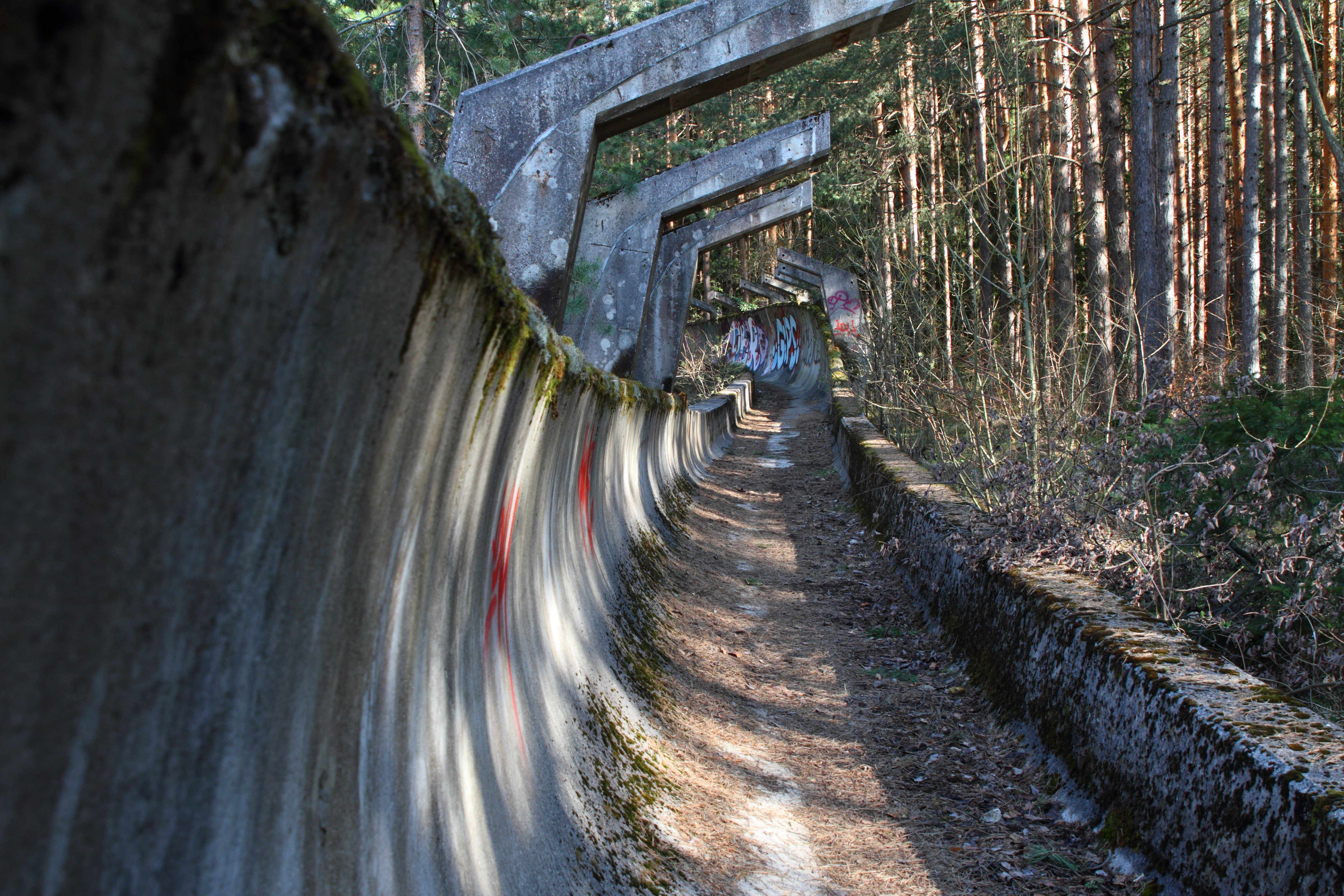 Die Reste der Olympischen Bobbahn von 1984 am Trebević bei Sarajewo.